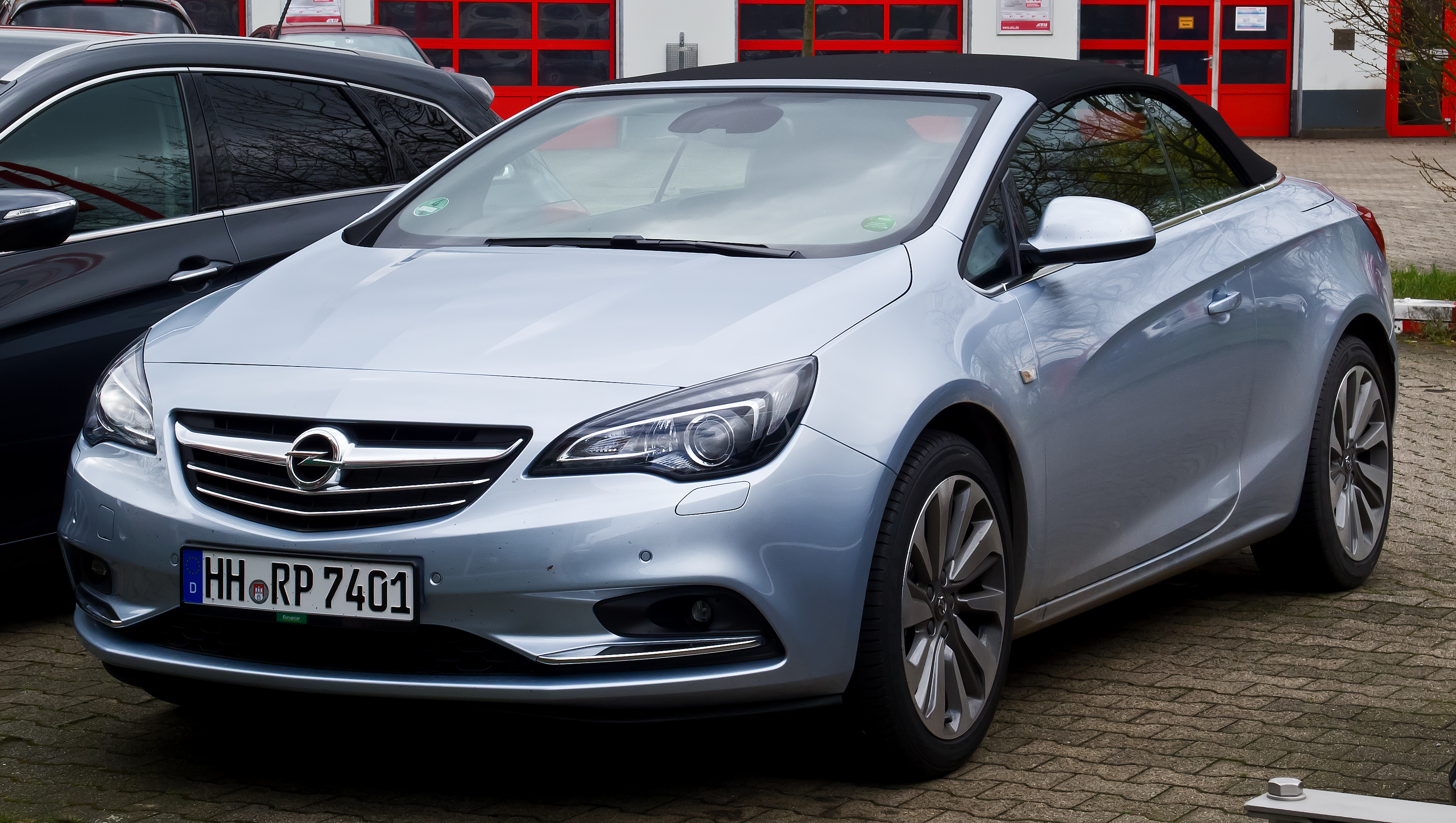 Opel Cascada 1.6 EDIT Innovation